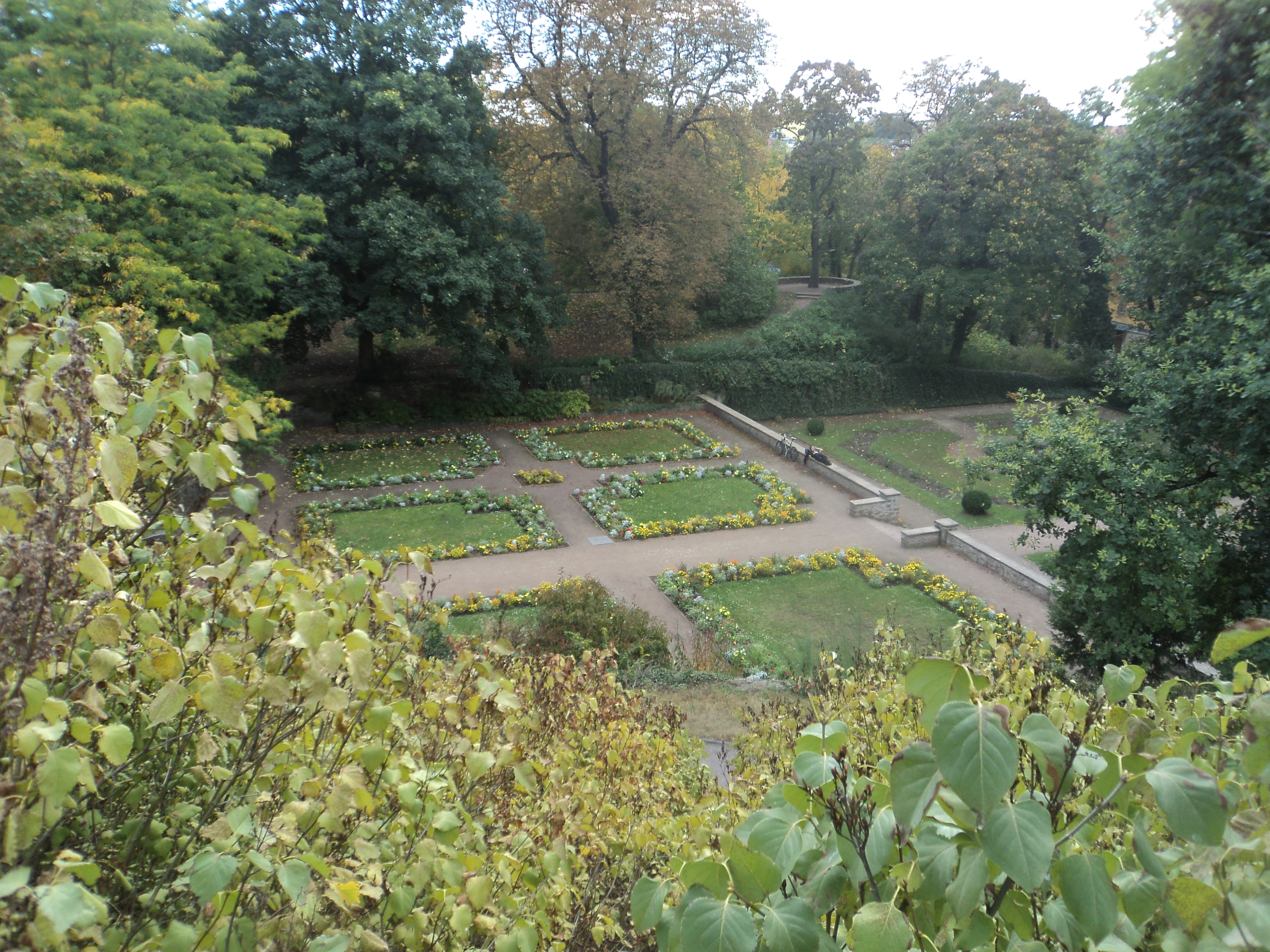 Amtsgarten in Halle (Saale) im Oktober, von oben links aufgenommen